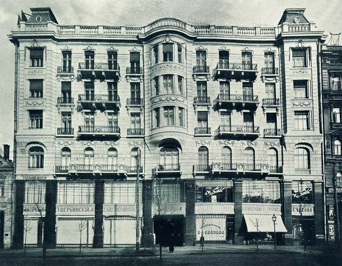 Будинок Крушевскької , Київ, вул. Богдана Хмельницького, 32